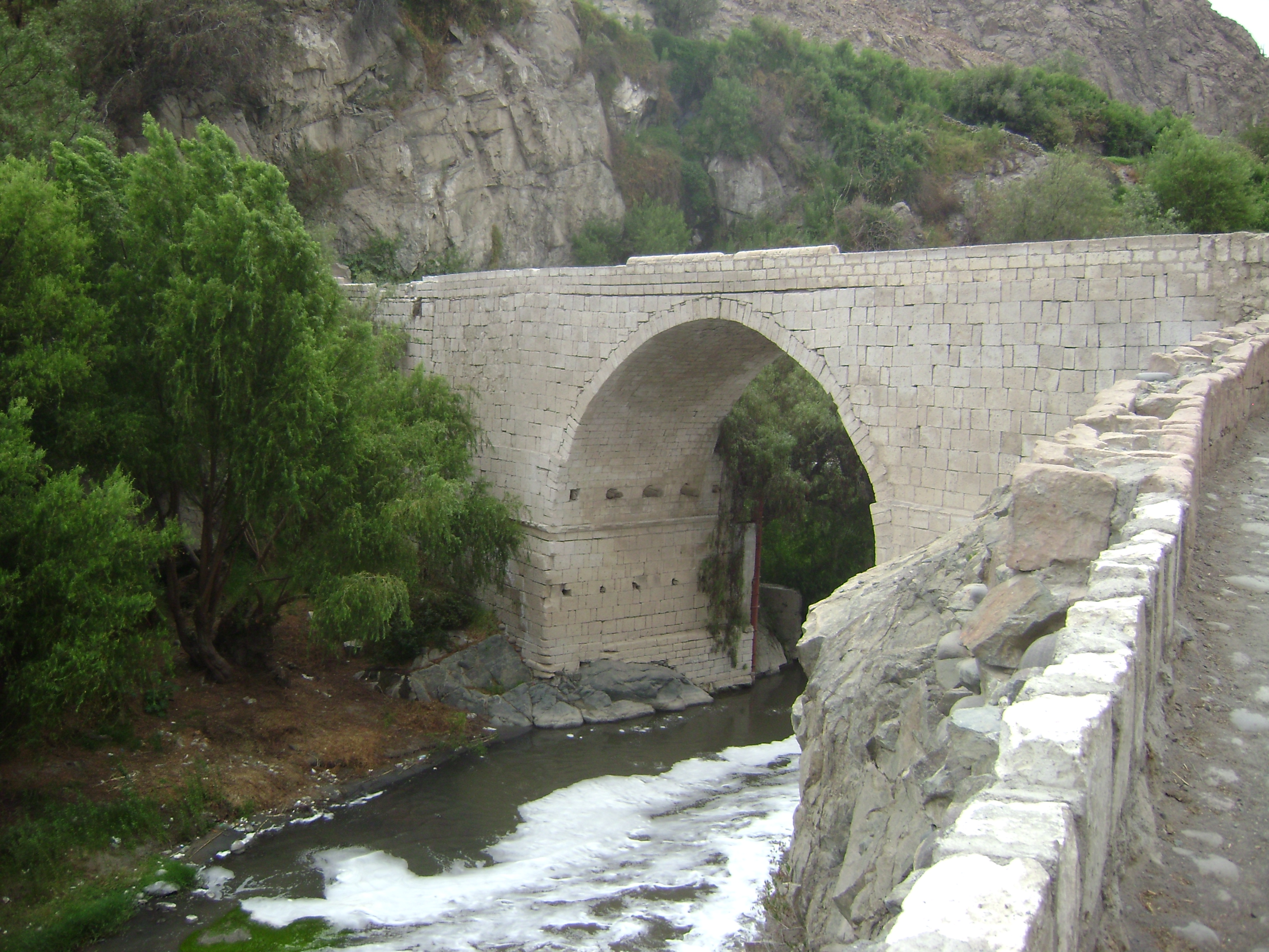 Puente de Uchumayo, Arequipa-Perú